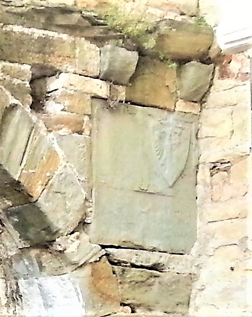 Stemma dei Visconti posto alla destra della fontana di Antescolis poco leggibile